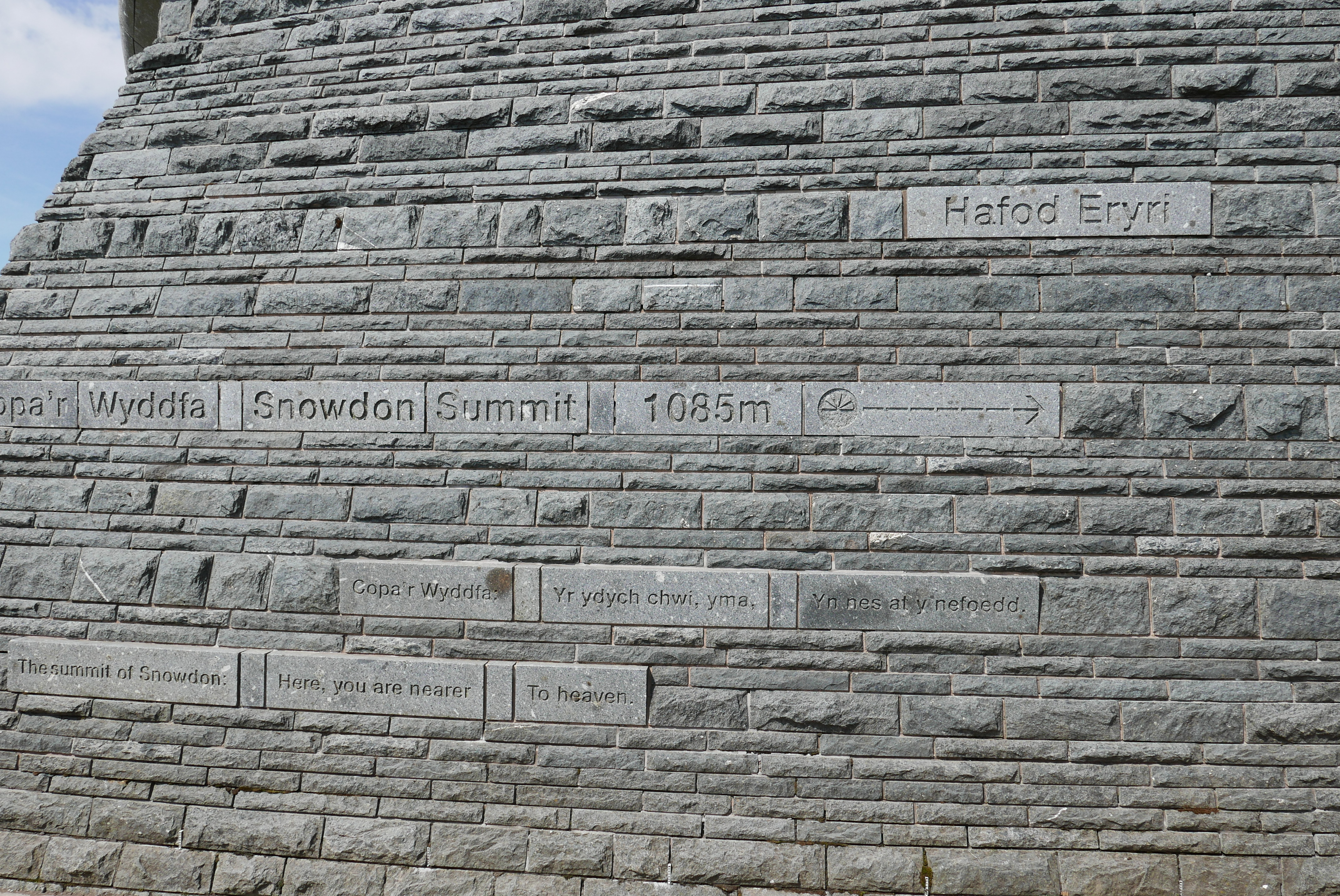 Sommet Mont Snowdon dans le parc national Snowdonia au Pays de Galles (Angleterre)